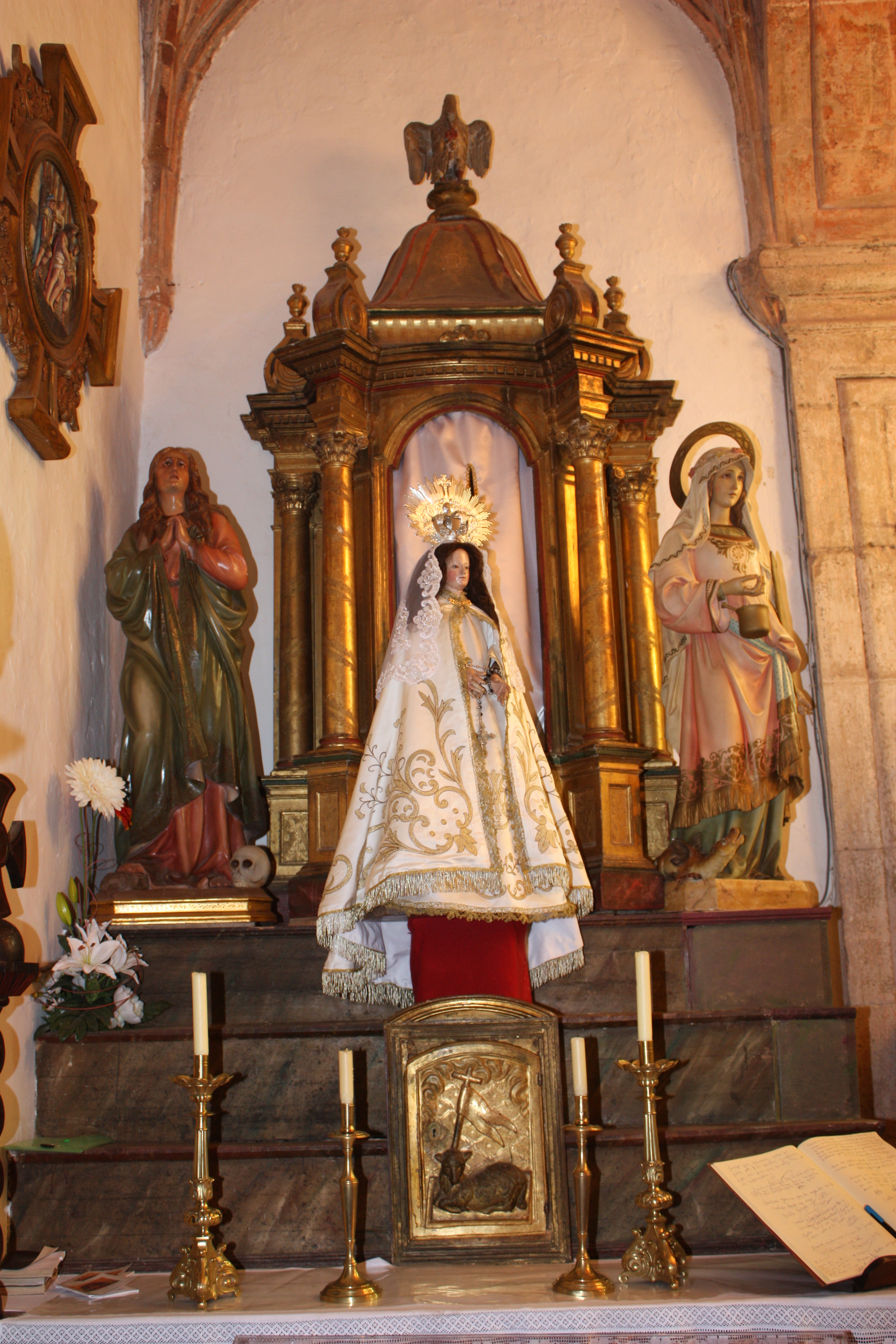 Santuario de Lugás. Villaviciosa. Asturias